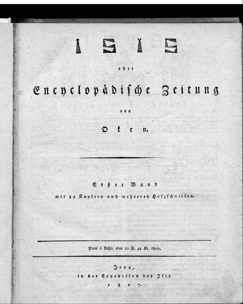 Dies ist ein Scan einer historischen Zeitschrift